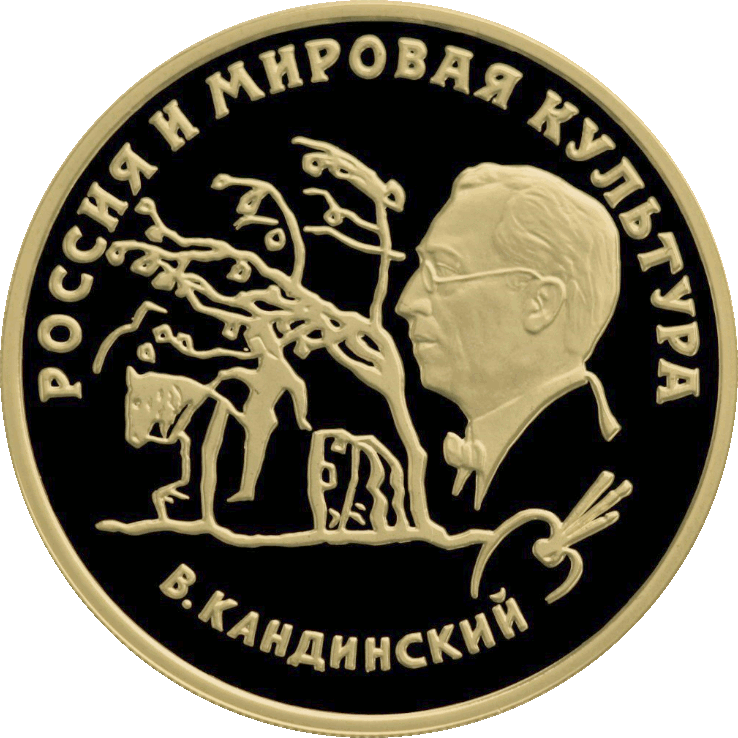 Монета Банка России — «Историческая серия», Вклад России в сокровищницу мировой культуры, В. В. Кандинский, 100 рублей, реверс.